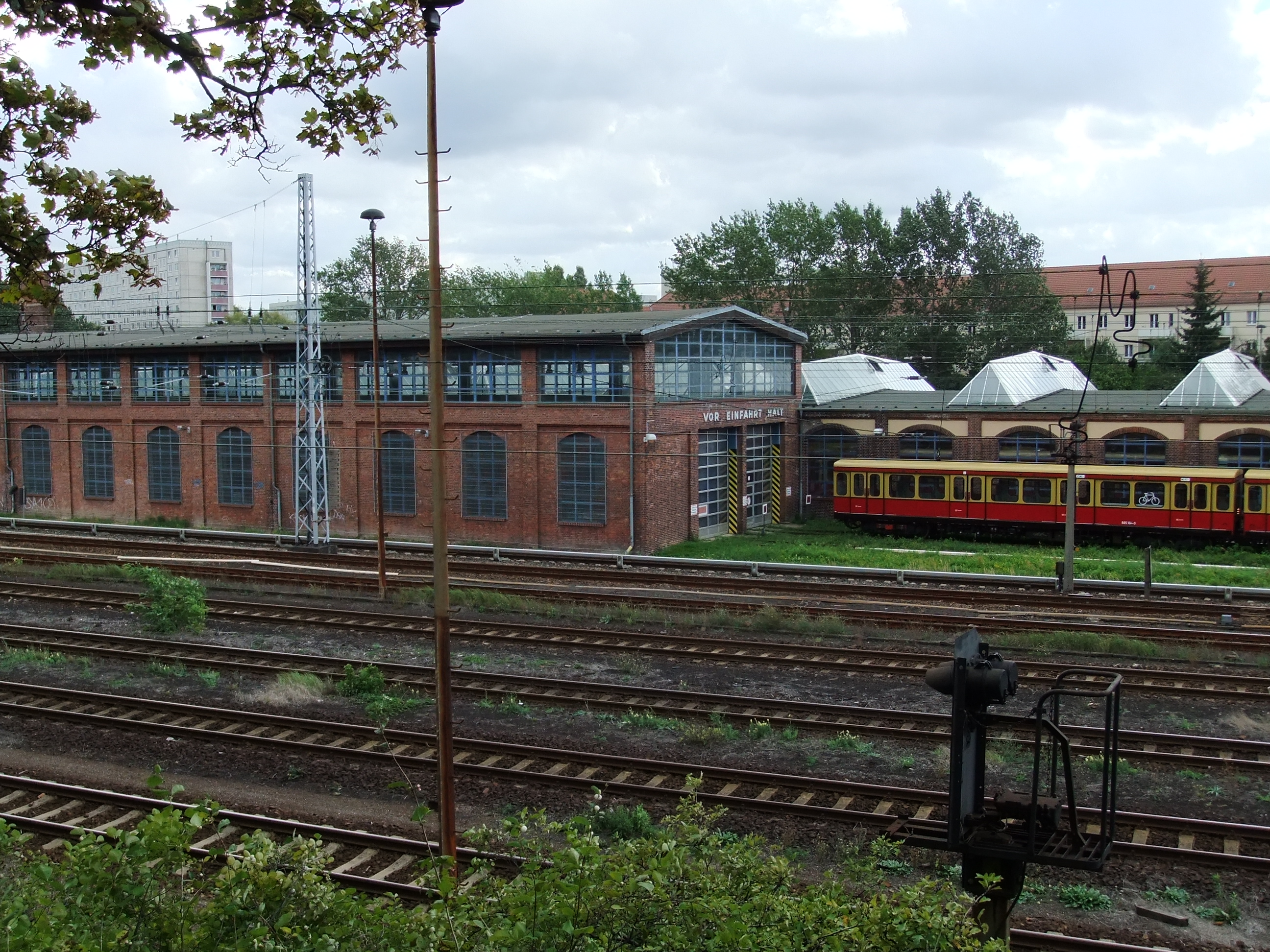 Denkmalliste Berlin 09040190 - Berlin Rummelsburg Rosenfelder Straße, S-Bahn-Betriebswerk, Alte und neue Wagenhalle, um 1905 und um 1955 von Günter Worlitzsch (Baudenkmal)